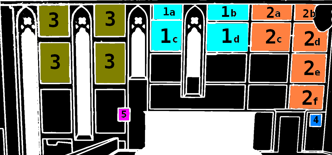 Schema degli affreschi della parete occidentale della chiesa di Napoli Santa Maria Donnaregina Vecchia 1. Storie di Santa Caterina a) Santa Caterina combatte contro gli idoli b) Santa Caterina è condotta in prigione c) Santa Caterina discute con i dottori d) Martirio dei dottori convertiti dalla Santa e corpi ammassati nell'anfiteatro 2. Storie di Sant'Agnese a) Sant'Agnese a scuola b) Incontro col figlio del prefetto c) Il giovane si reca dal padre di Agnese d) Sant'Agnese è condotta nel lupanare e) Martirio della Santa f) Guarigione della figlia di Costantino, Costanza, recatasi a pregare al sepolcro della Santa 3. Apostoli e Profeti 4. Adorazione dei Magi 5. Affresco